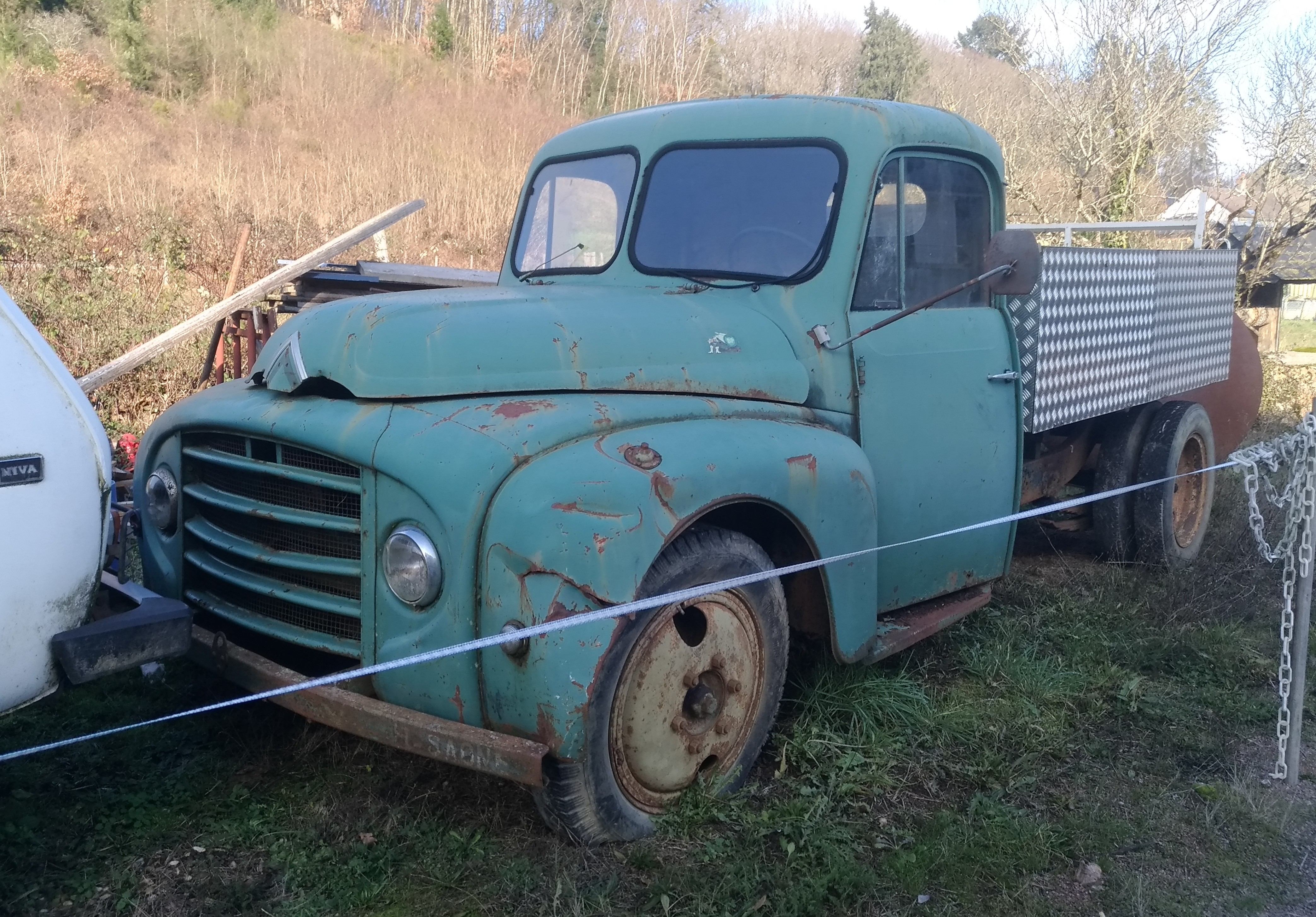 Citroen U23 (1.9 D 52 hp) at La Celle-en-Morvan